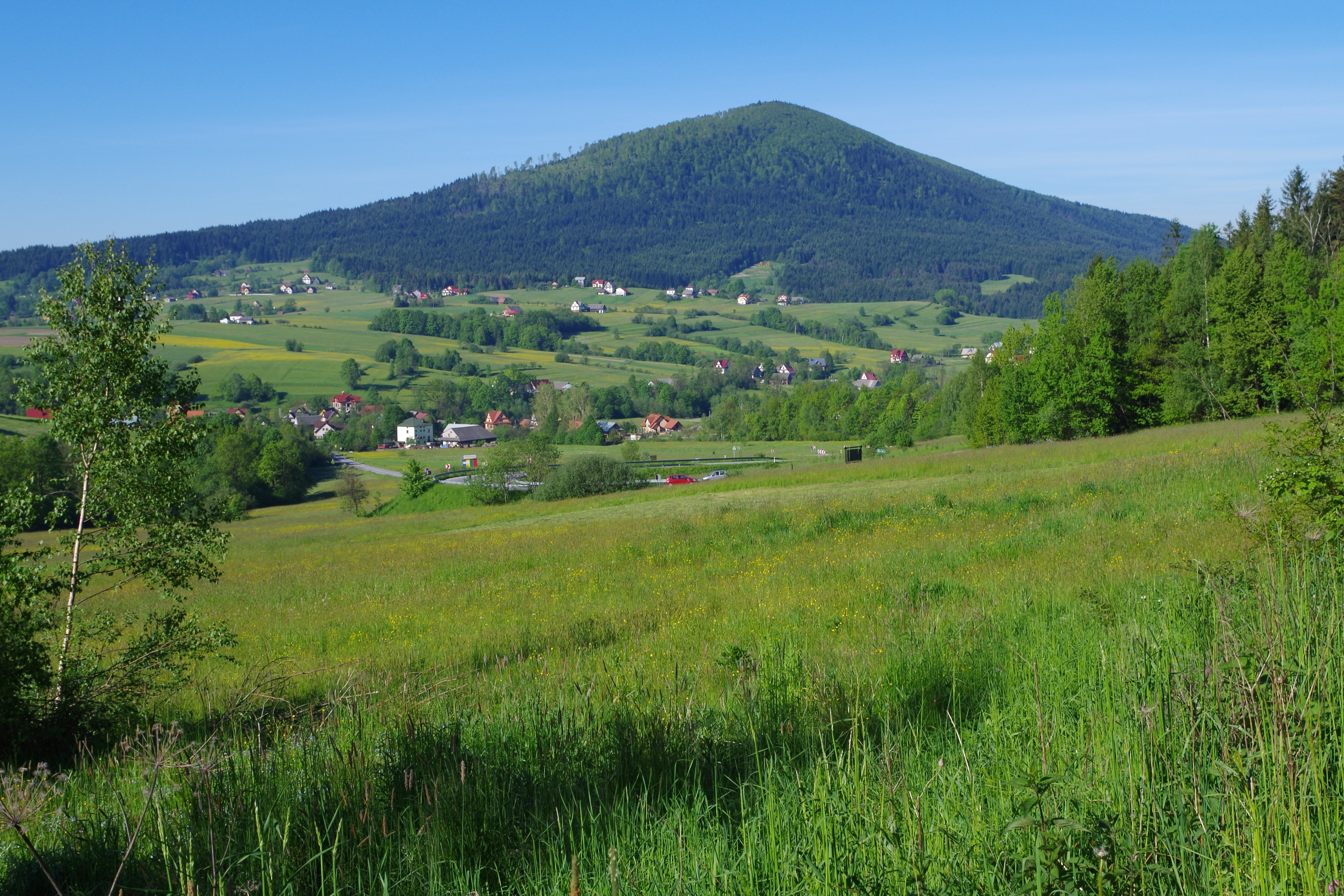 Lubogoszcz, widok z Kasiny Wielkiej